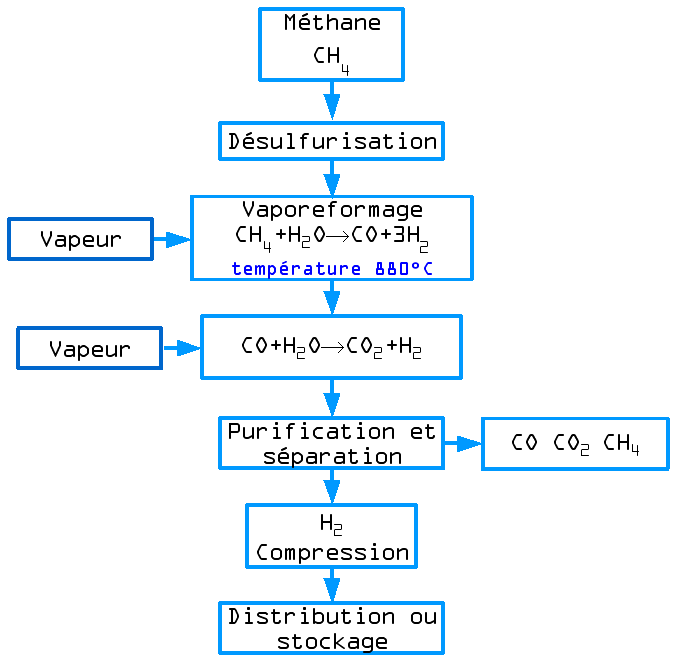 Production de dihydrogène par Vaporéformage